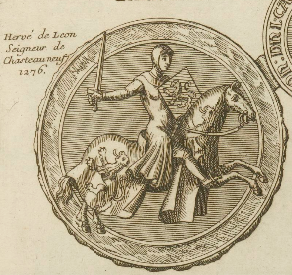 Sceau d'Hervé IV, seigneur de Léon [Finistère, Bretagne, France] (1220/1290)